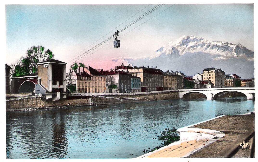 Grenoble, carte 50 -real photo